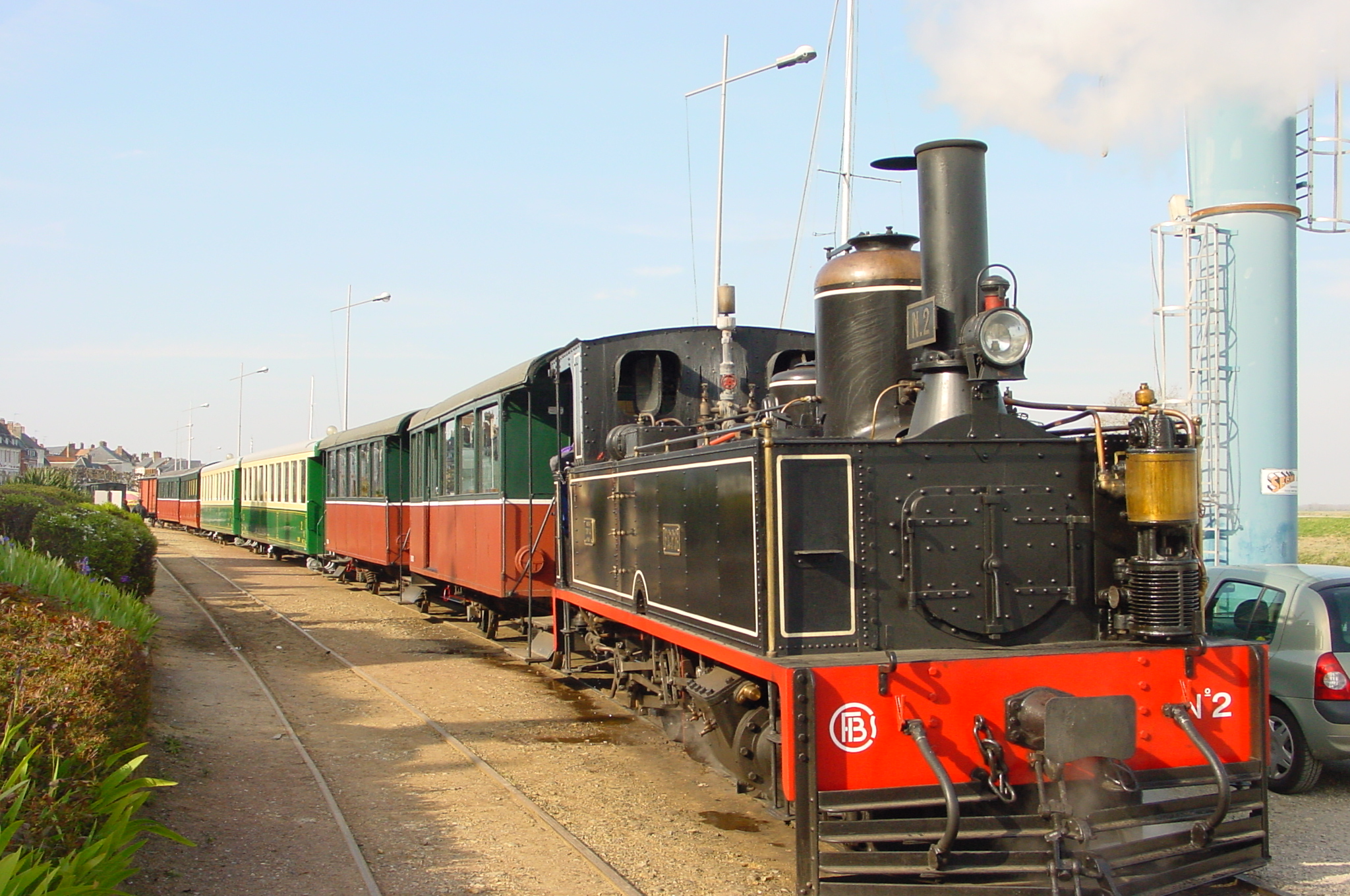 Train du chemin de fer de la Baie de Somme (CFBS) à Saint-Valéry-sur-Somme